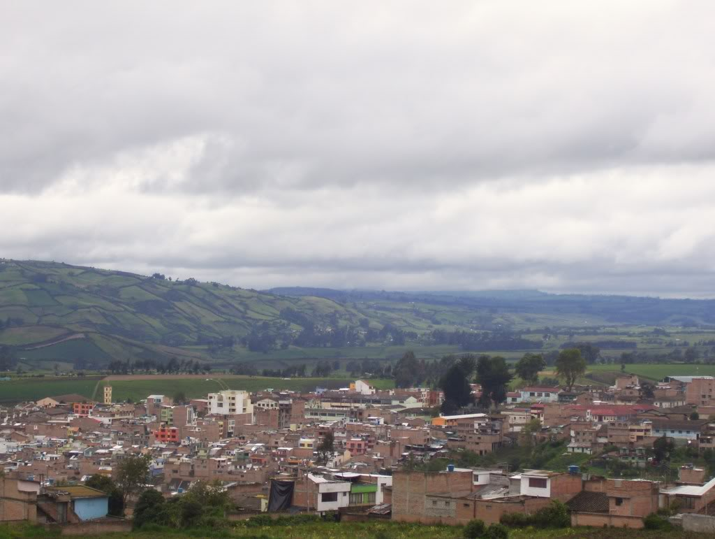 Panorámica sobre algunos barrios del municipio de Túquerres, en Colombia.